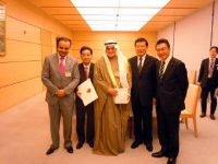 松崎公昭（クウェート議連幹事長として）